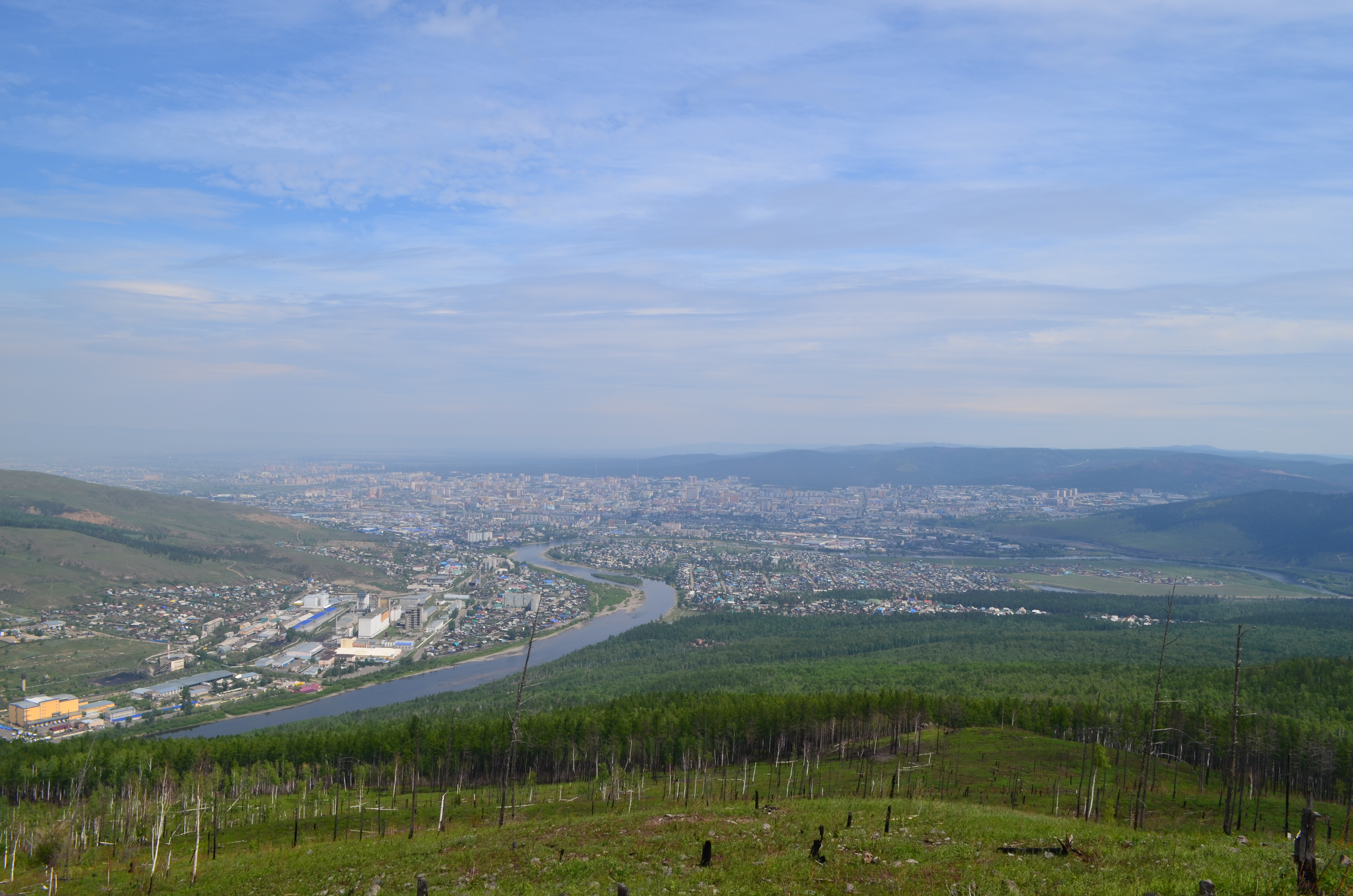 снимки конца июня - начала июля 2015 г.